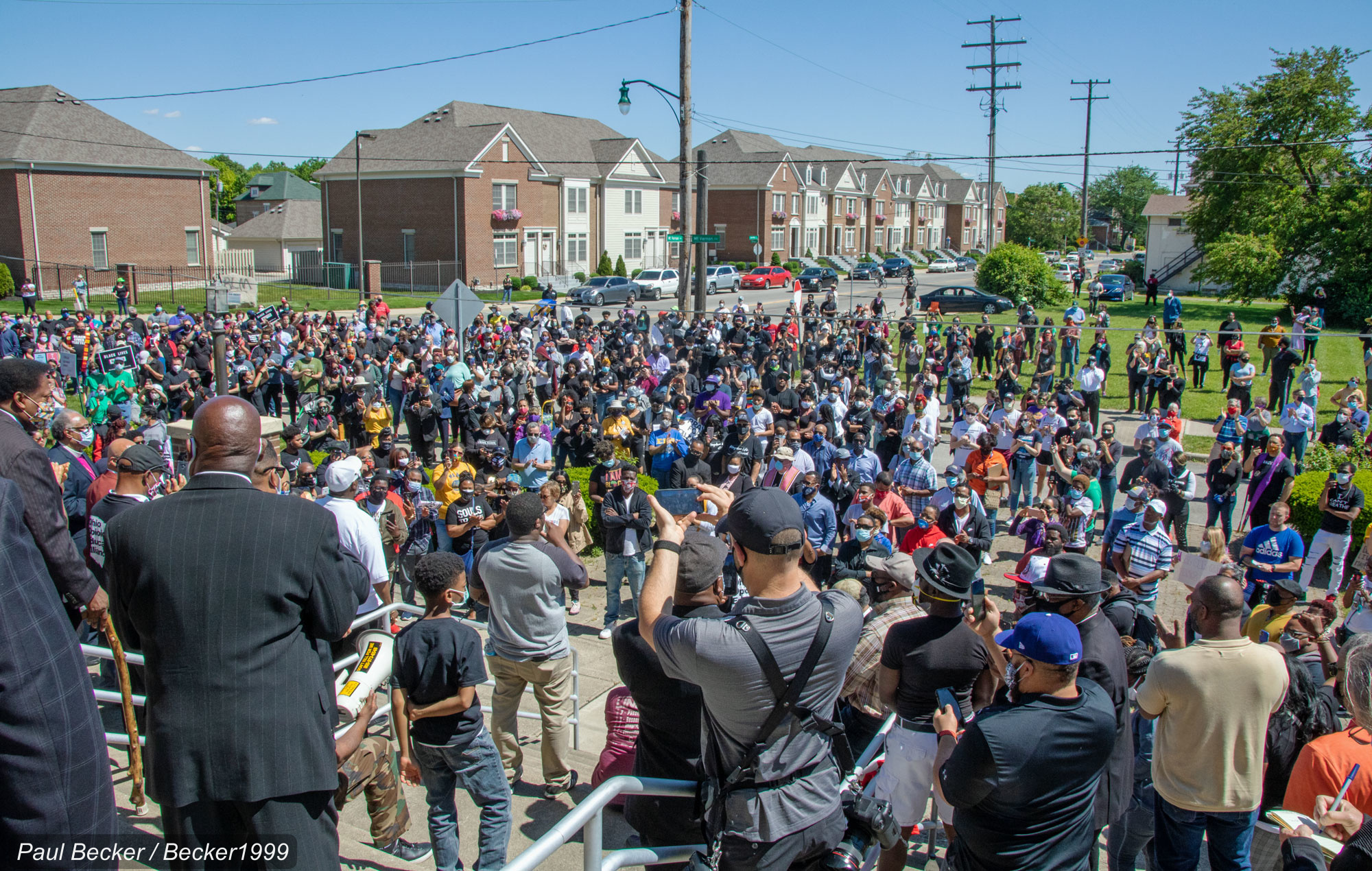 bIMG_3179